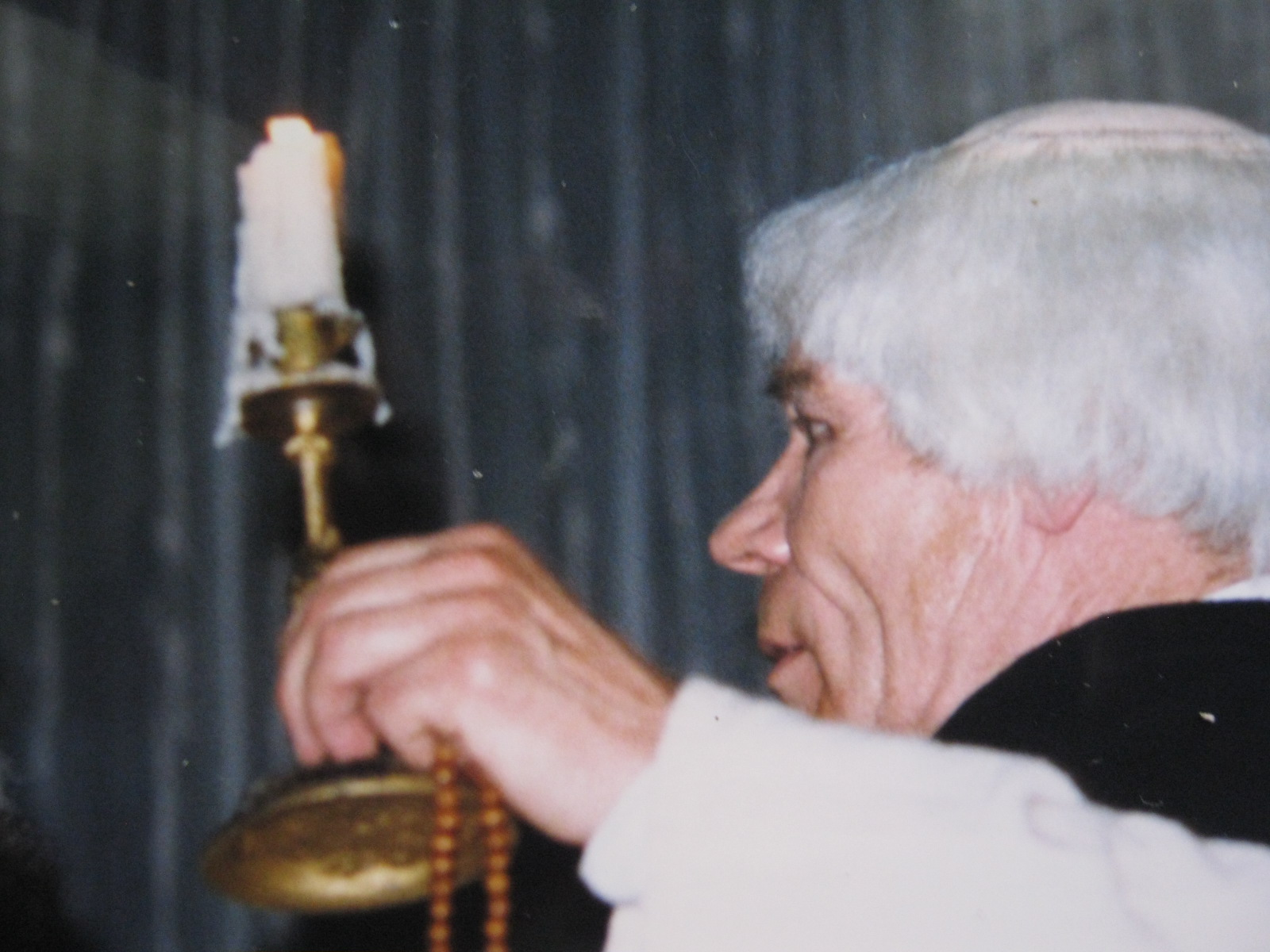 Сцена из спектакля «Дар Божий» Санкт-Петербургского драматического театра «Патриот» РОСТО. В роли Великого Инквизитора Юрий Оськин.